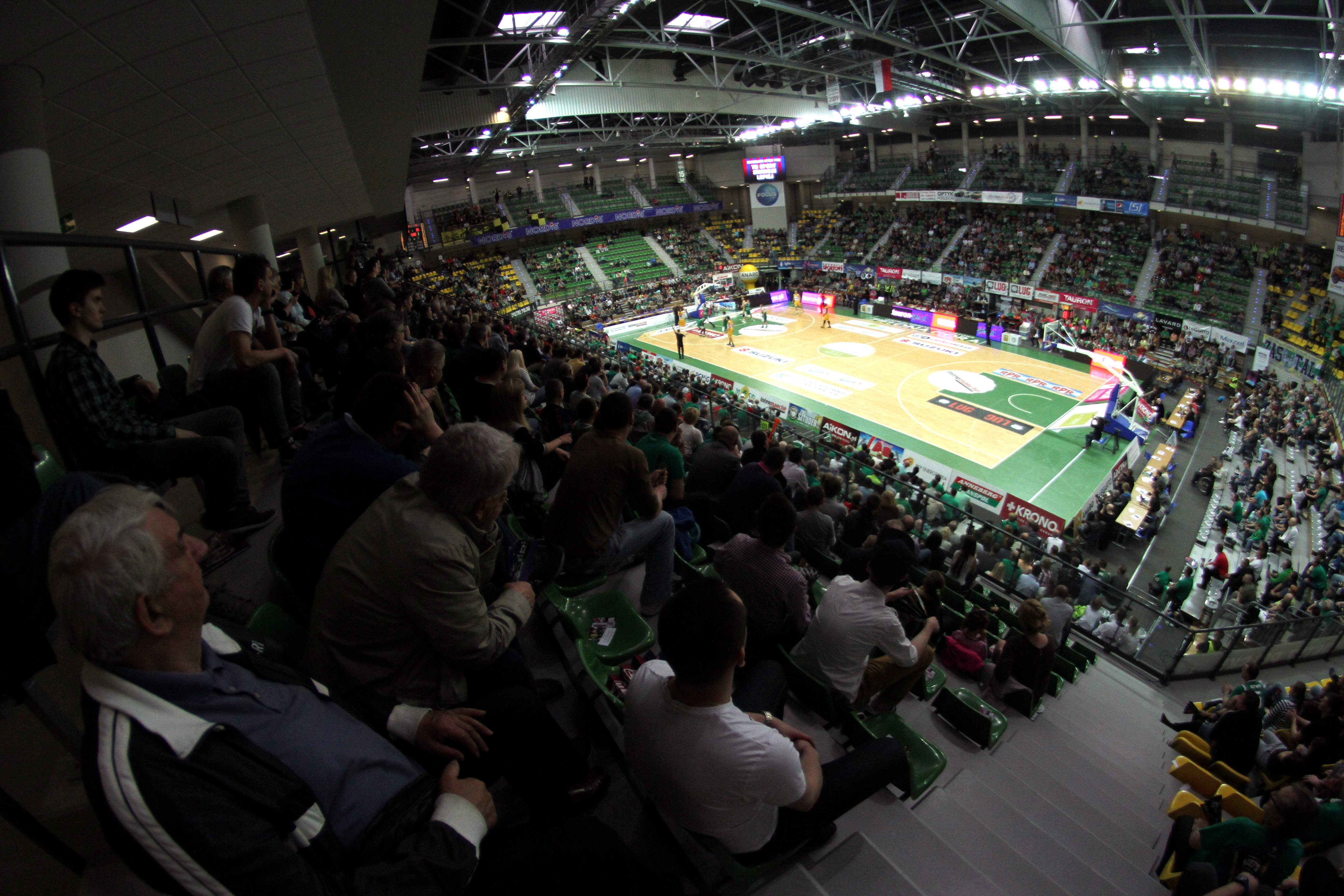 Hala CRS w Zielonej Górze podczas meczu Tauron Basket Ligi